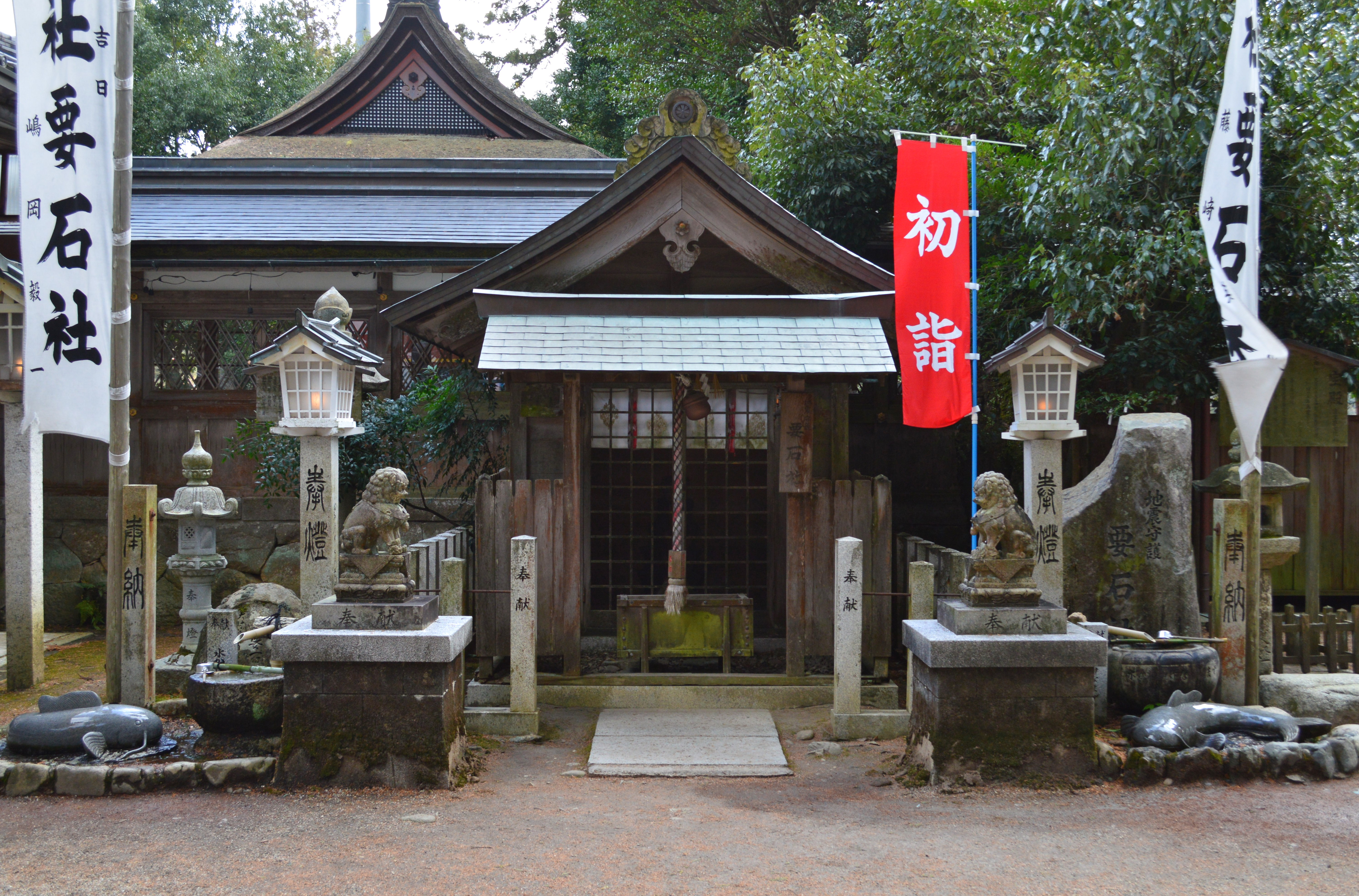 大村神社 (伊賀市) 境内要石社